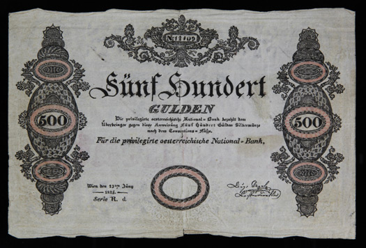 Eine der zwischen 1841 und 1845 von Peter Ritter von Bohr angefertigten nahezu perfekten Fälschungen. Original aus dem Besitz des Geldmuseums der Oesterreichischen Nationalbank.